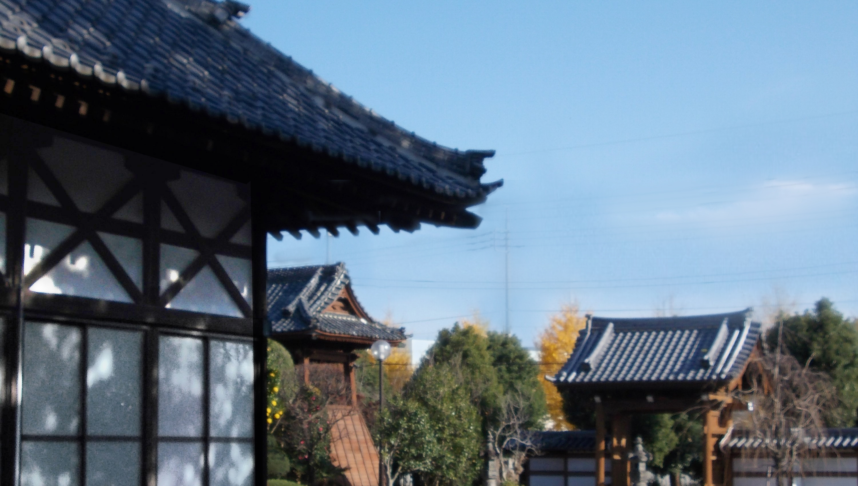 松伏石川民部・静栖寺